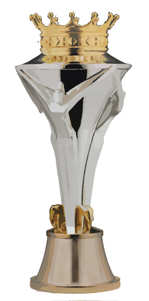 Drawing of Thai Premier League Trophy